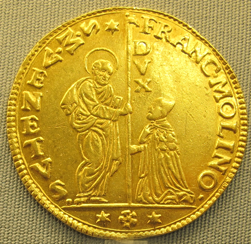 Venezia, 10 zecchini di francesco molin, 1646-1655